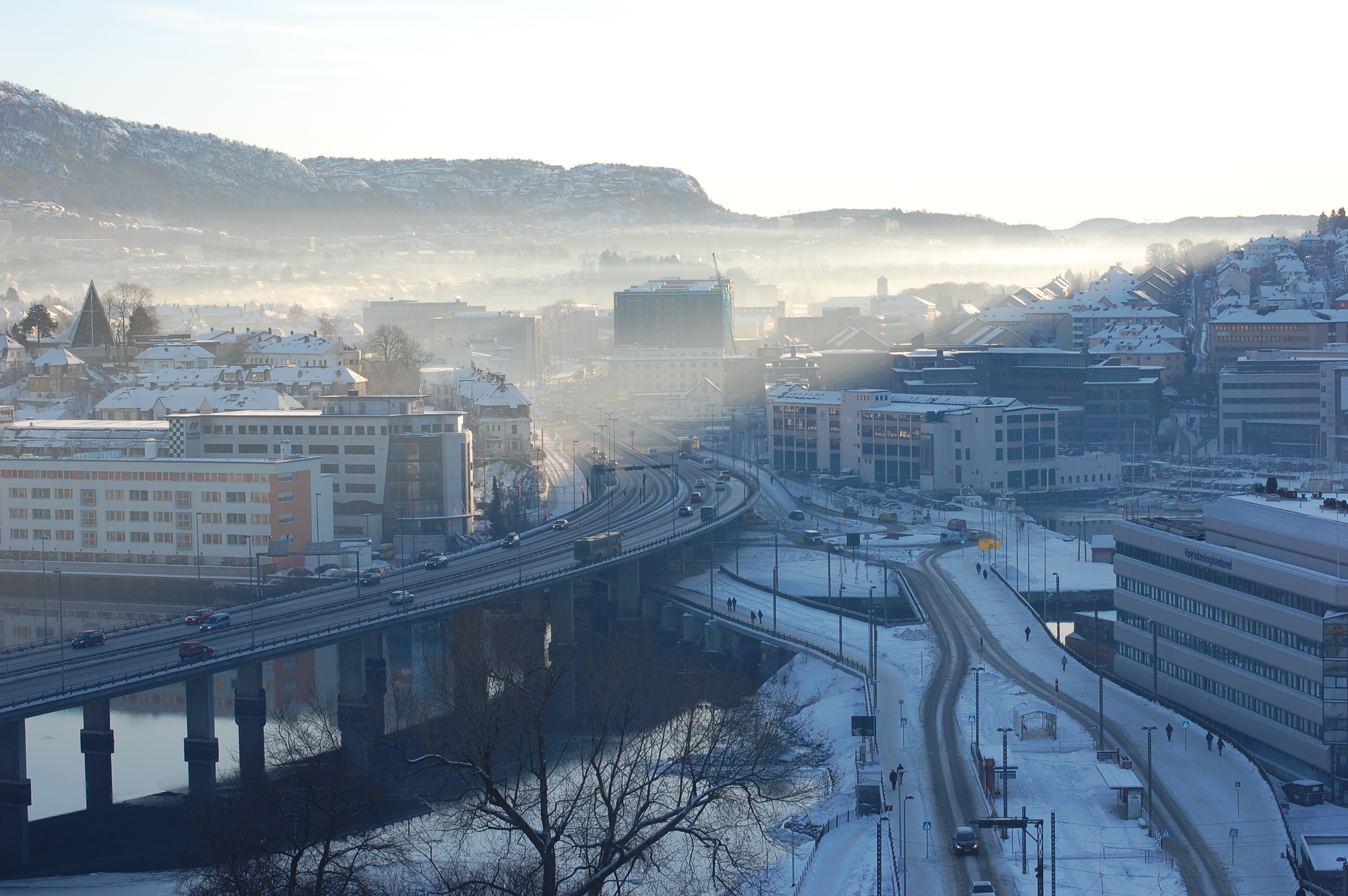 Bilde tatt mot sør. Danmarksplass og Nygårdsbroene i forgrunnen. Bergensdalen ligger innhyllet i forurensing. Da bildet ble tatt ble det på Danmarksplass målt følgende: NO2: 363 µg/m3; PM10: 138,1 µg/m3 og PM2.5: 113,8 µg/m3 samt en uvanlig værtype med kuldeperiode og flere dager med stille vær